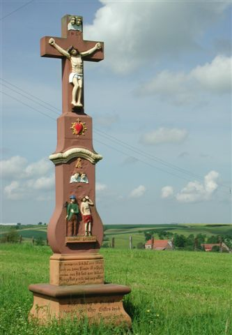 Croix à Rolbing